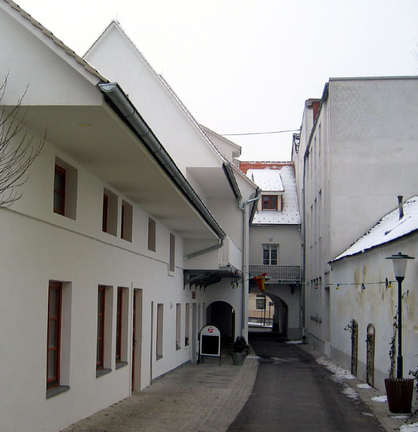 Durchgangshaus in Pinkafeld, Burgenland, Austria